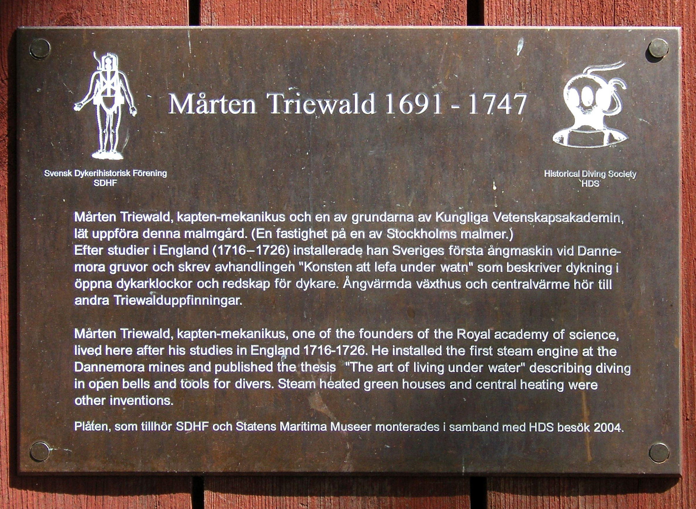 Informationstavala vid Mårten Triewalds Malmgård i Stockholm